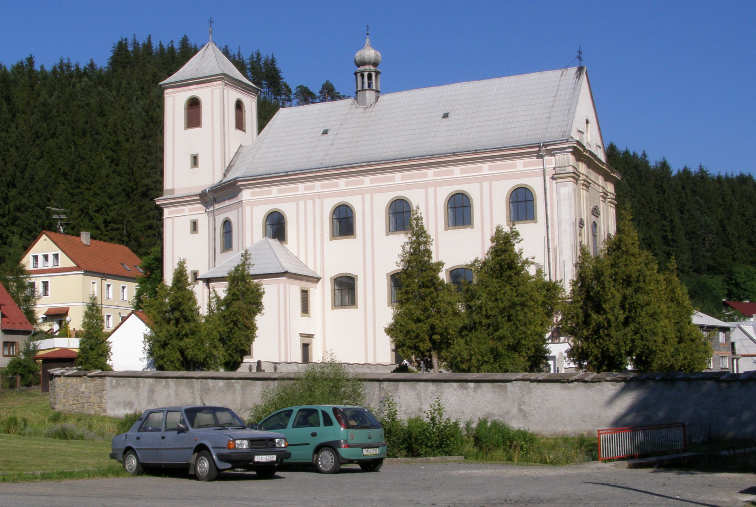 Kostel sv. Anny v Rajnochovicích